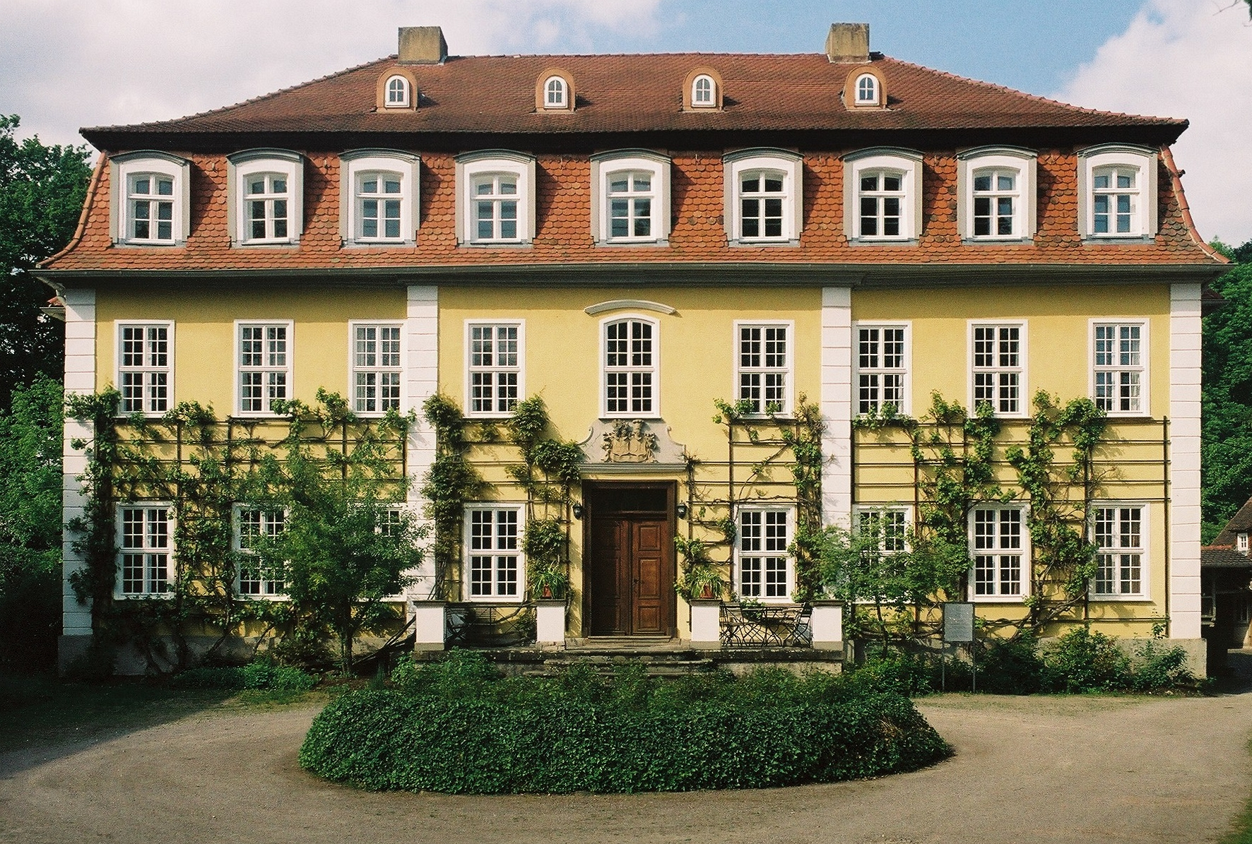 Schloss Imshausen, Sitz von Adam von Trott